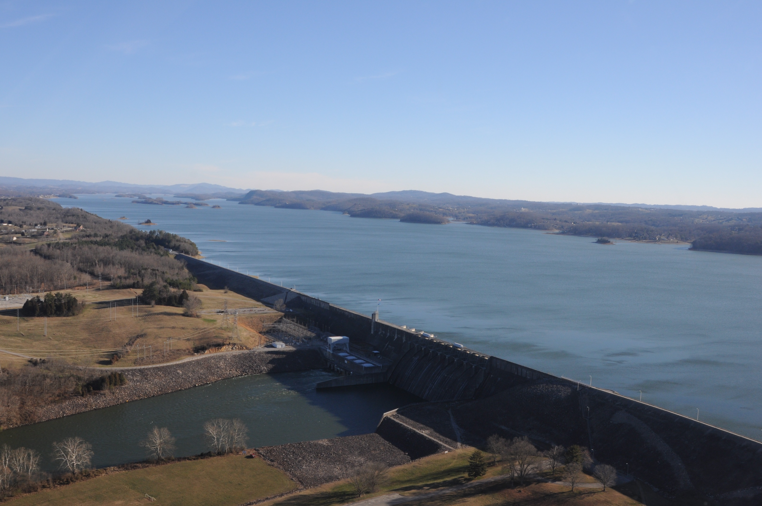 Cherokee Dam